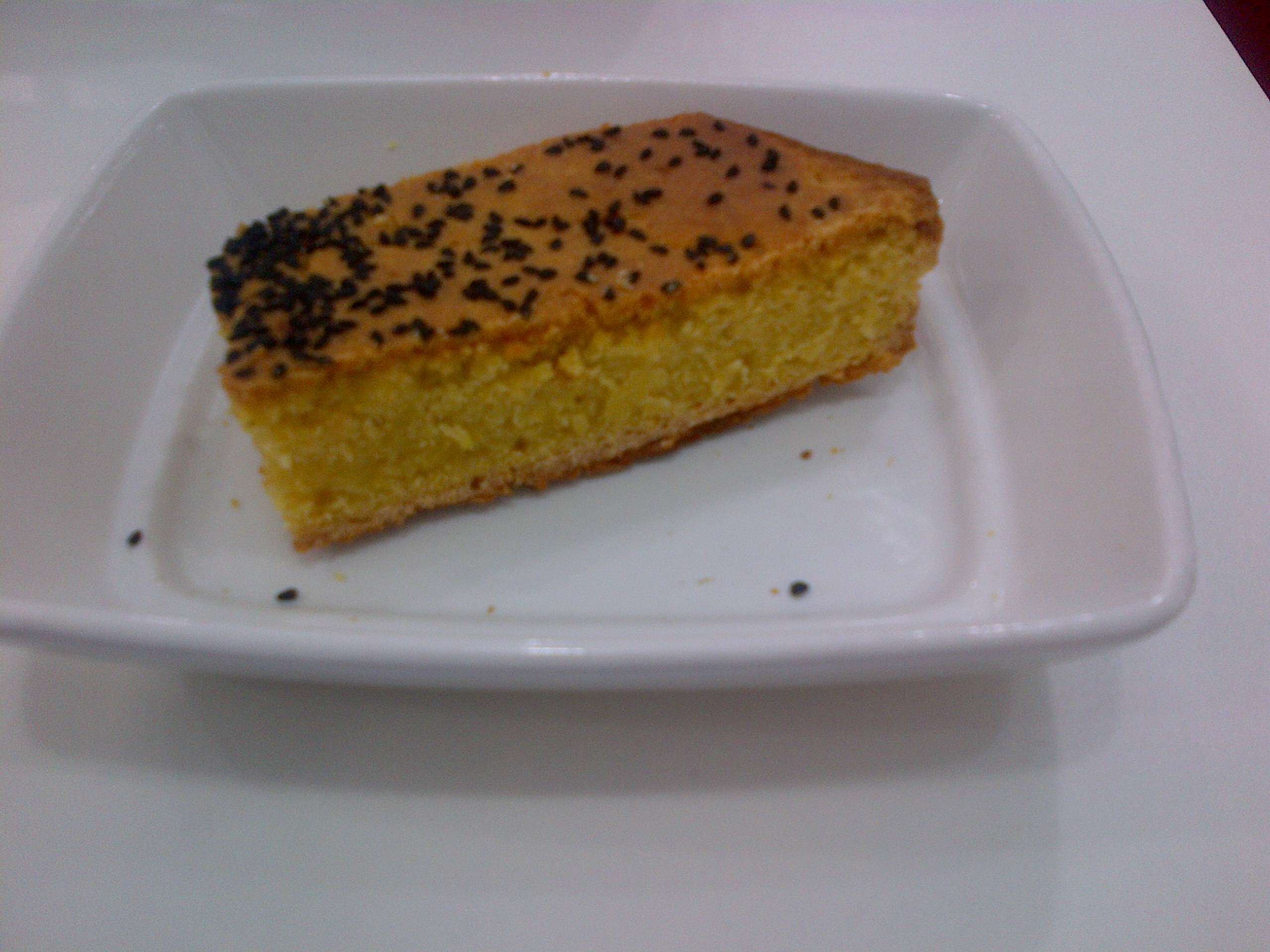 Pan de harina de choclo, alimento tipico de la region del Mar Negro.